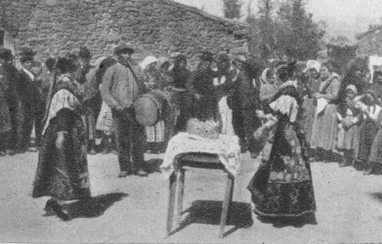 Baile de la rosca - Zarza de Pomareda (Salamanca) - España Turística y Monumental / Cuarto álbum / Las Bellezas de Castilla / Región Leonesa - Cromo 70 x 50 Sepia